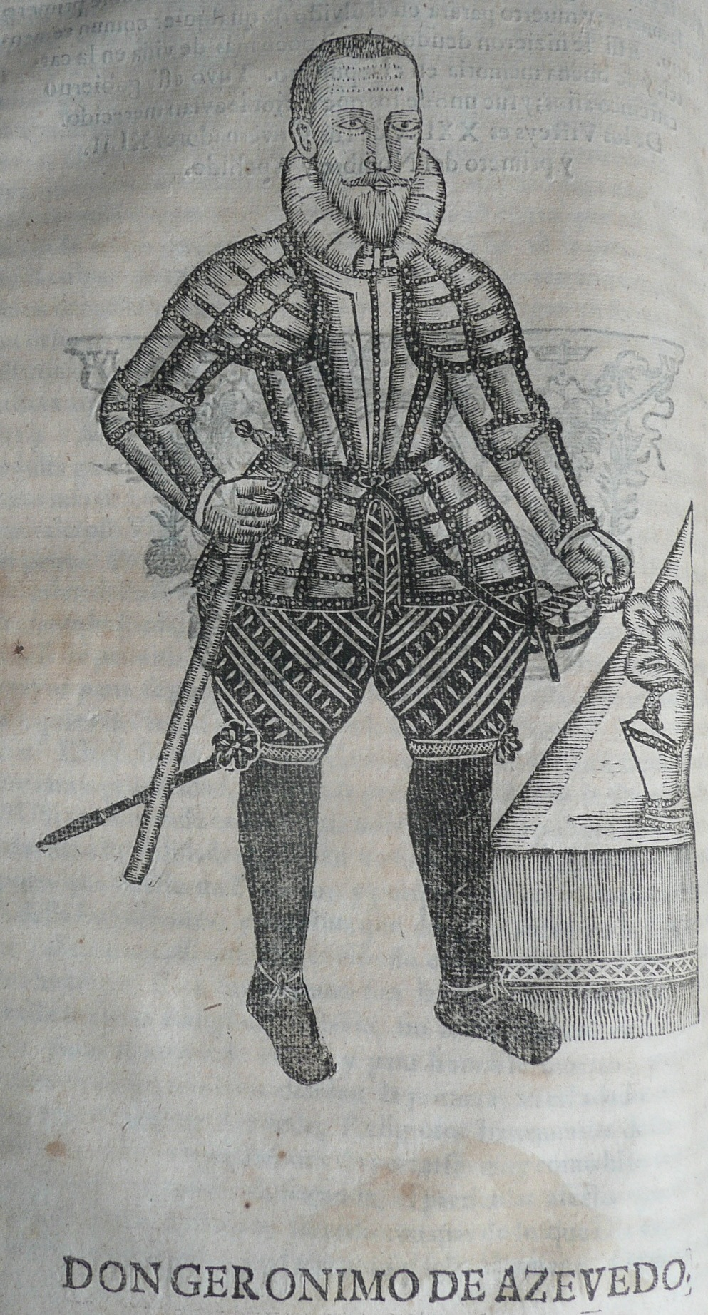 portrait de Jerónimo de Azevedo, Vice-roi des Indes portugaises